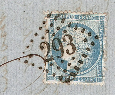 Lettre de France (Bains les Vosges), affranchie avec un 25 c. bleu Céres de 1871 et affranchi avec un cachet gros chiffre 293